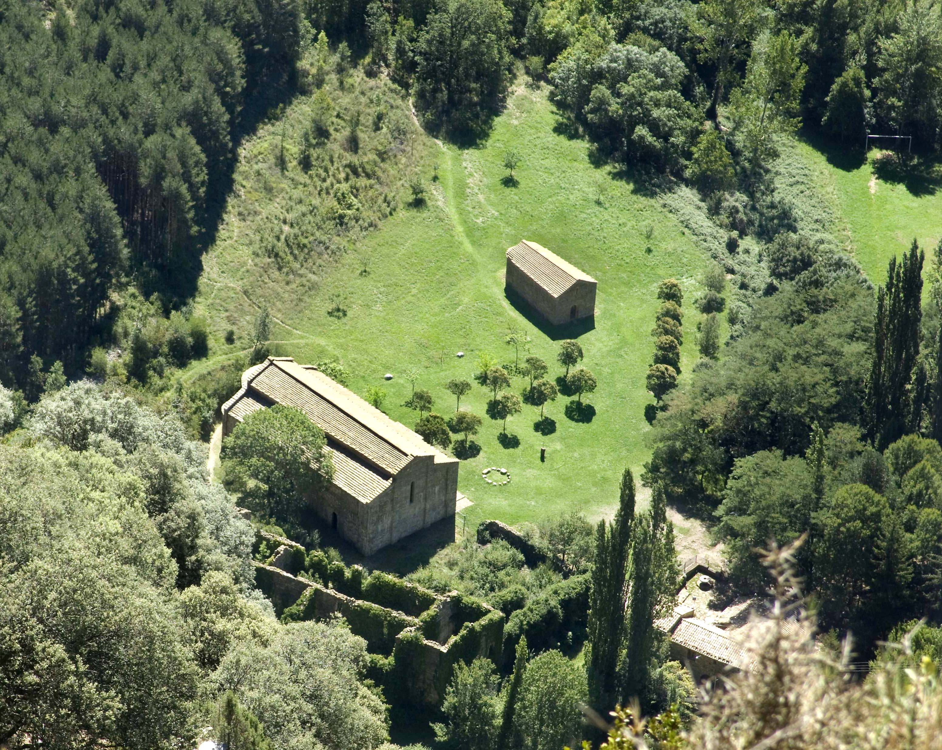 Santa Maria d'Ovarra és un monestir romànic situat al Prepirineu, al peu de l'extrem occidental de la serra de Sis.